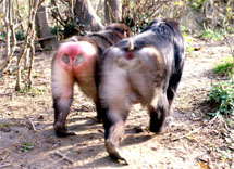 Macaques de Tonkean (Macaca tonkeana) mâle et femelle.